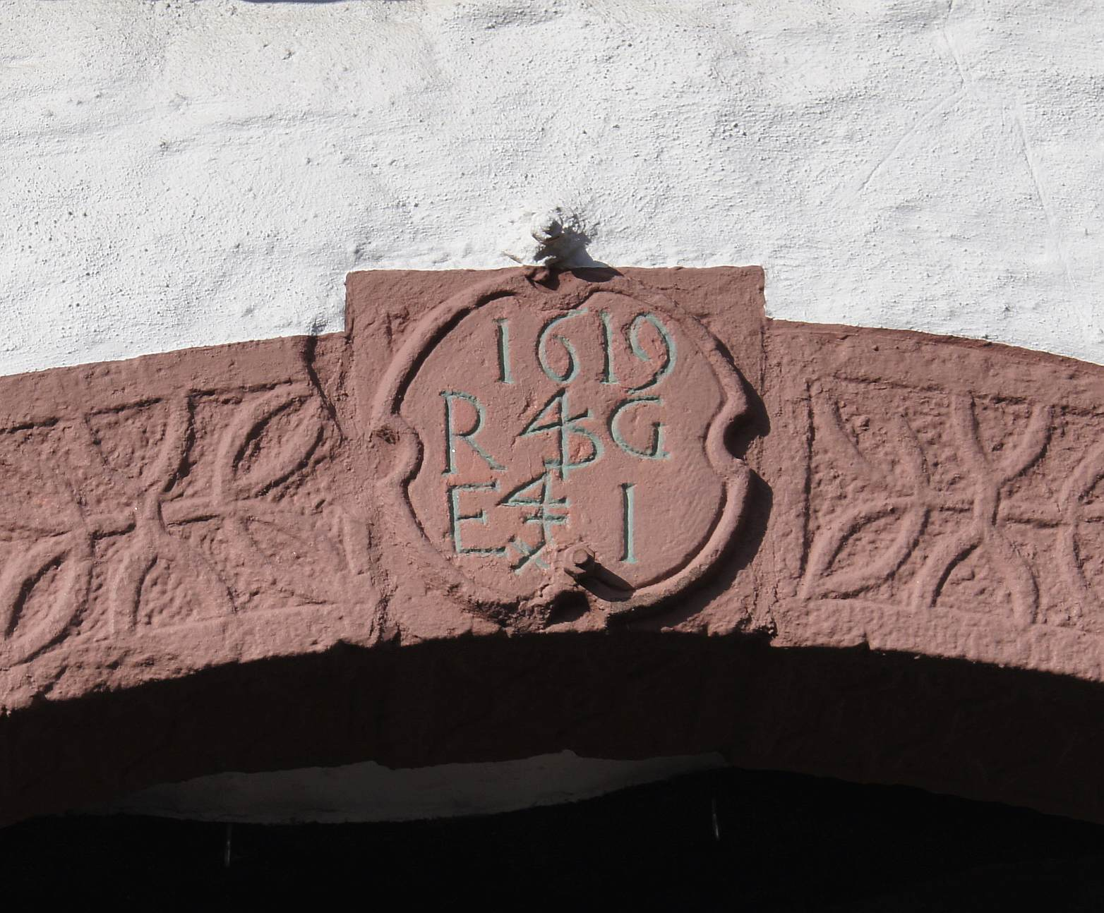 Baudenkmal Schleiden, Gemünd Eifel, Teil EIngangsbogen "Trutzburg" Bergstraße 5